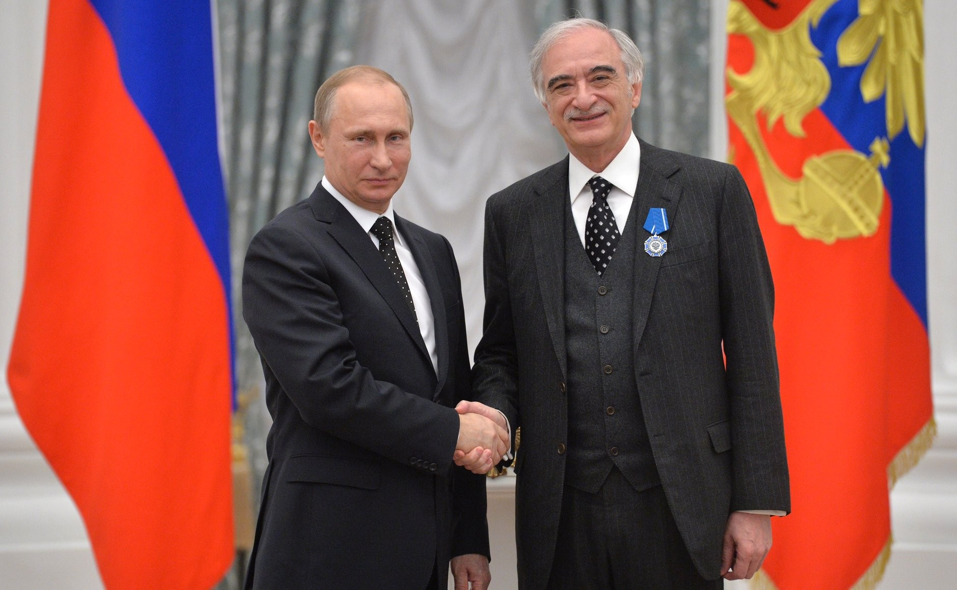 Церемония вручения государственных наград Российской Федерации. Чрезвычайный и Полномочный Посол Азербайджанской Республики в Российской Федерации Полад Бюльбюль-оглы награждён орденом Почёта